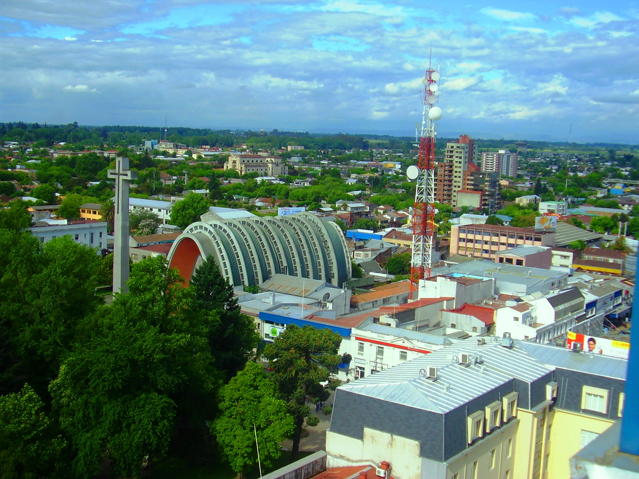 Vista Panorámica del Edificio Rucamanqui Chillan